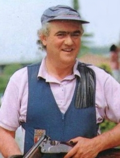 Il tiratore italiano Luciano Giovannetti